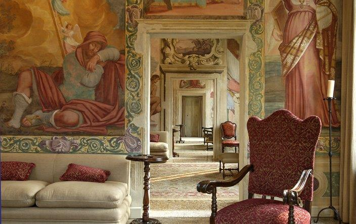 Prospettiva interna piano nobile Villa Borromeo Padova